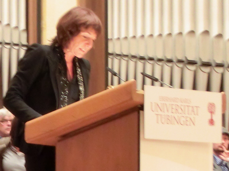 Prof. Dr. Dorothee Kimmich (* 1961), deutsche Literaturwissenschaftlerin und Professorin für Literaturwissenschaftliche Kulturwissenschaft / Kulturtheorie an der Eberhard Karls Universität Tübingen, bei der Eröffnung der Tübinger Poetik-Dozentur am 18. November 2013.